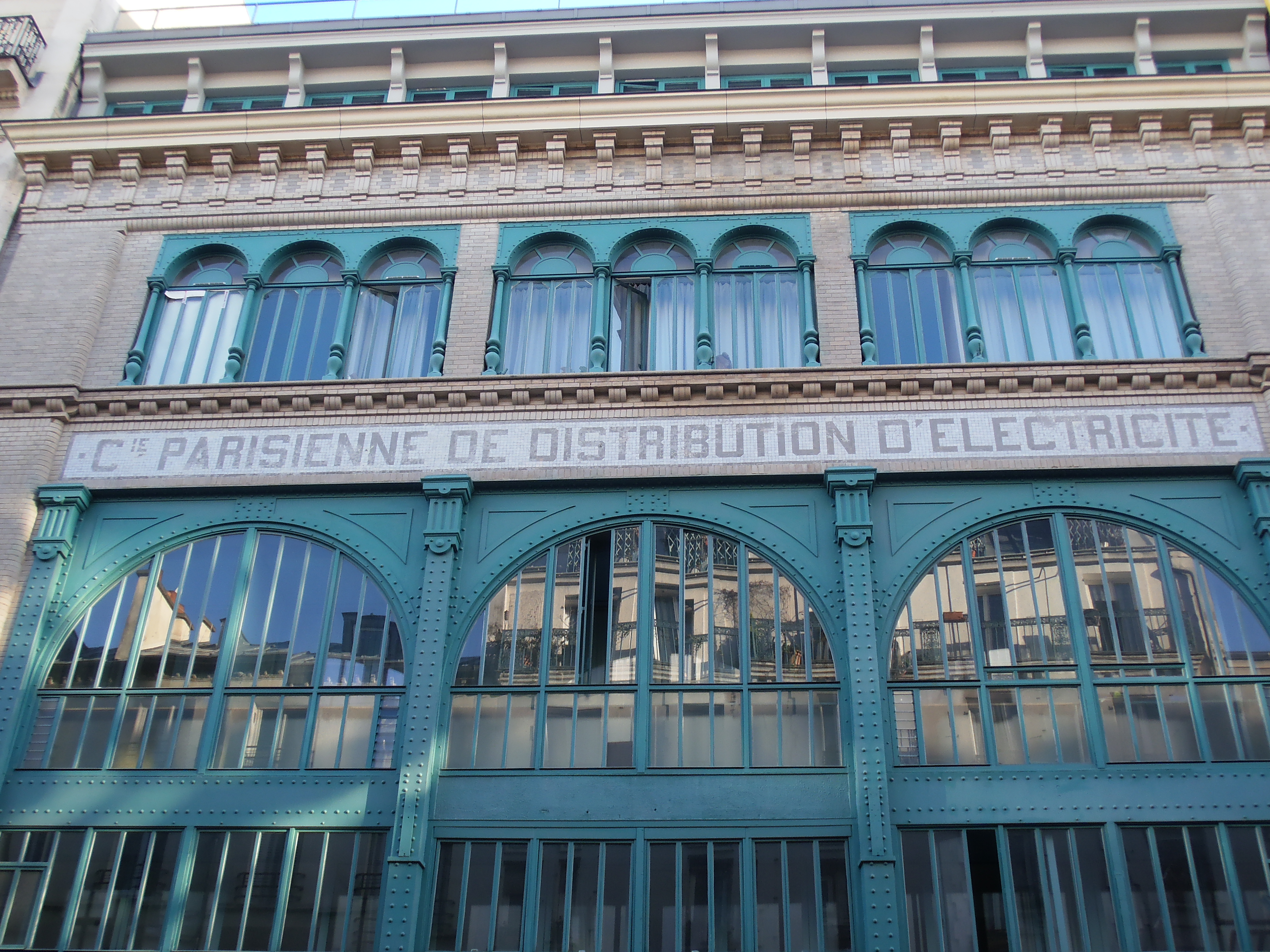 Compagnie Parisienne de distribution d'électricité (CPDE, façade, rue Jacques Louvel-Tessier, Paris 10ème)